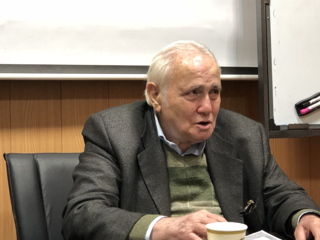 در حال شعرخوانی در جلسه ادبی